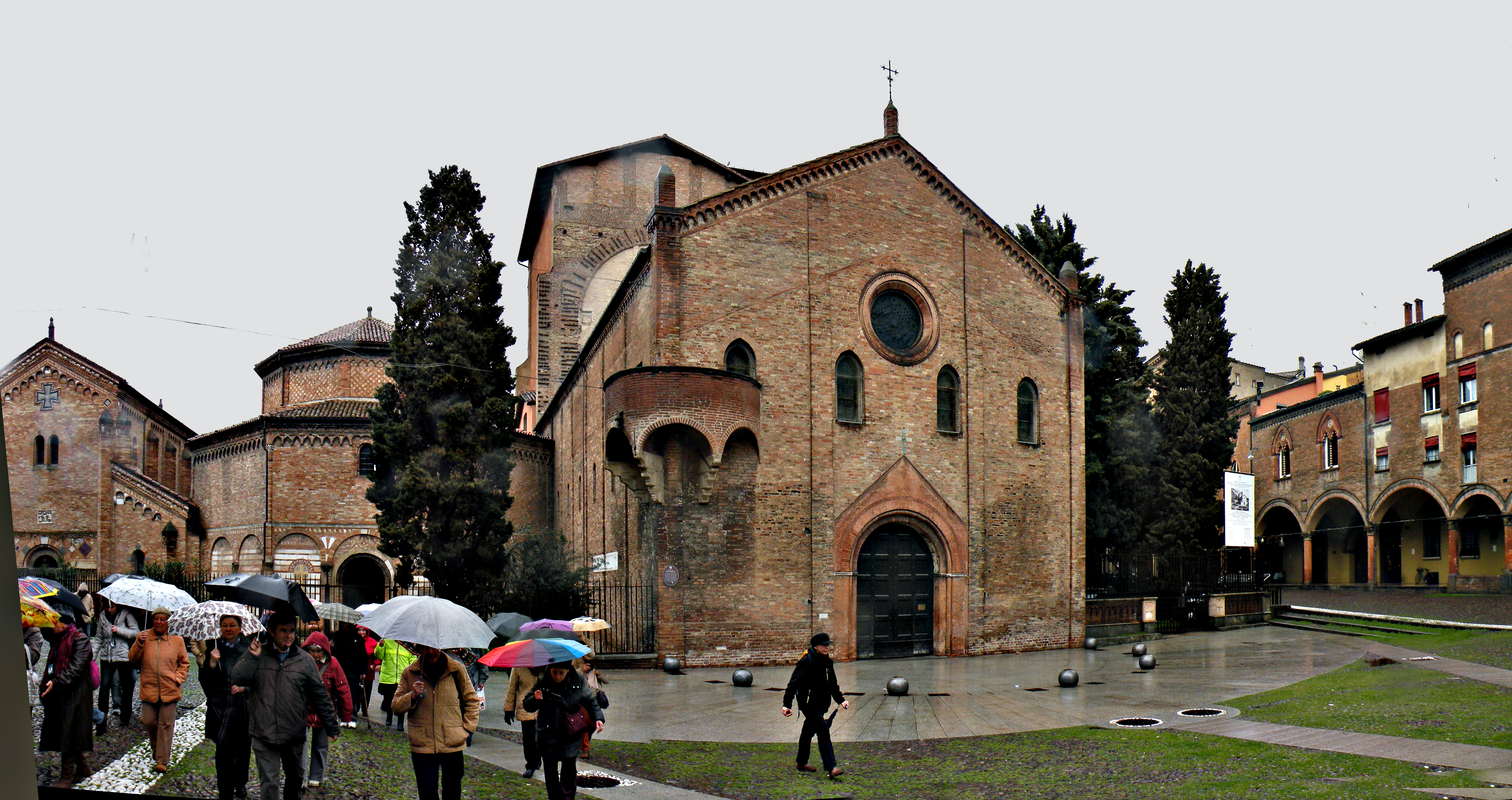 Церковный комплекс Сан Стефано в Болонье